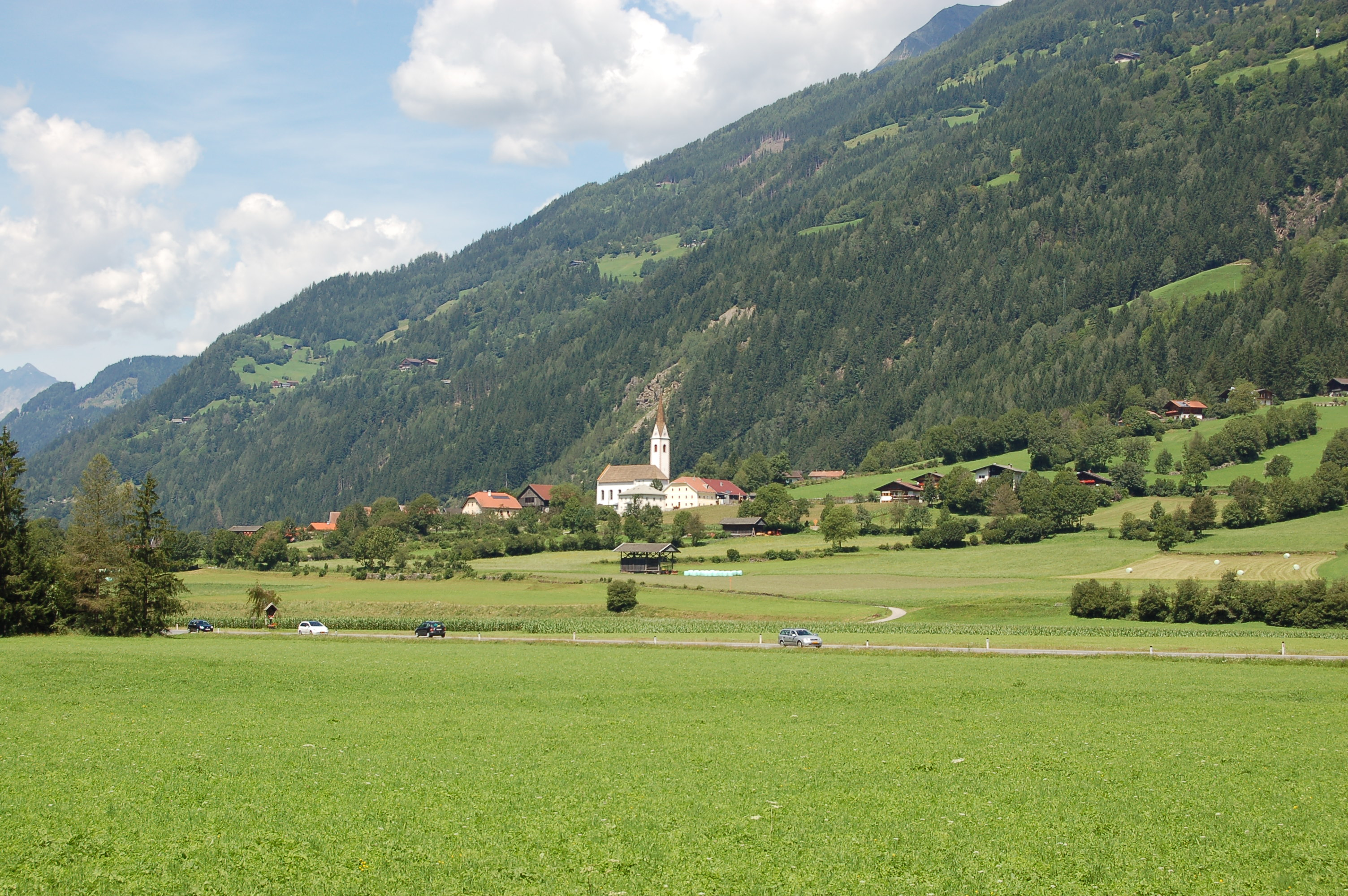 Ainet. Sicht auf die Pfarrkirche vom Radweg